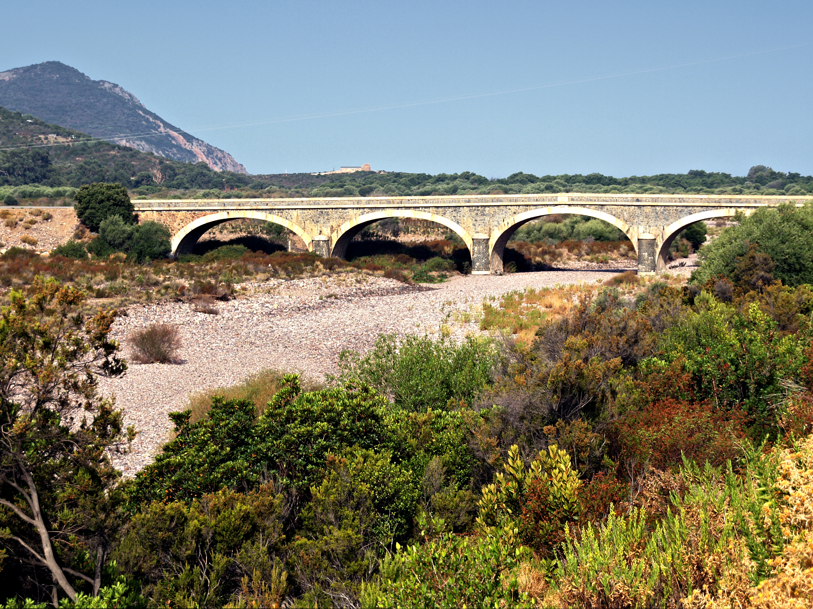 Galéria (Haute-Corse) - Pont des 5 arcades, route D81, sur la rivière Fango.